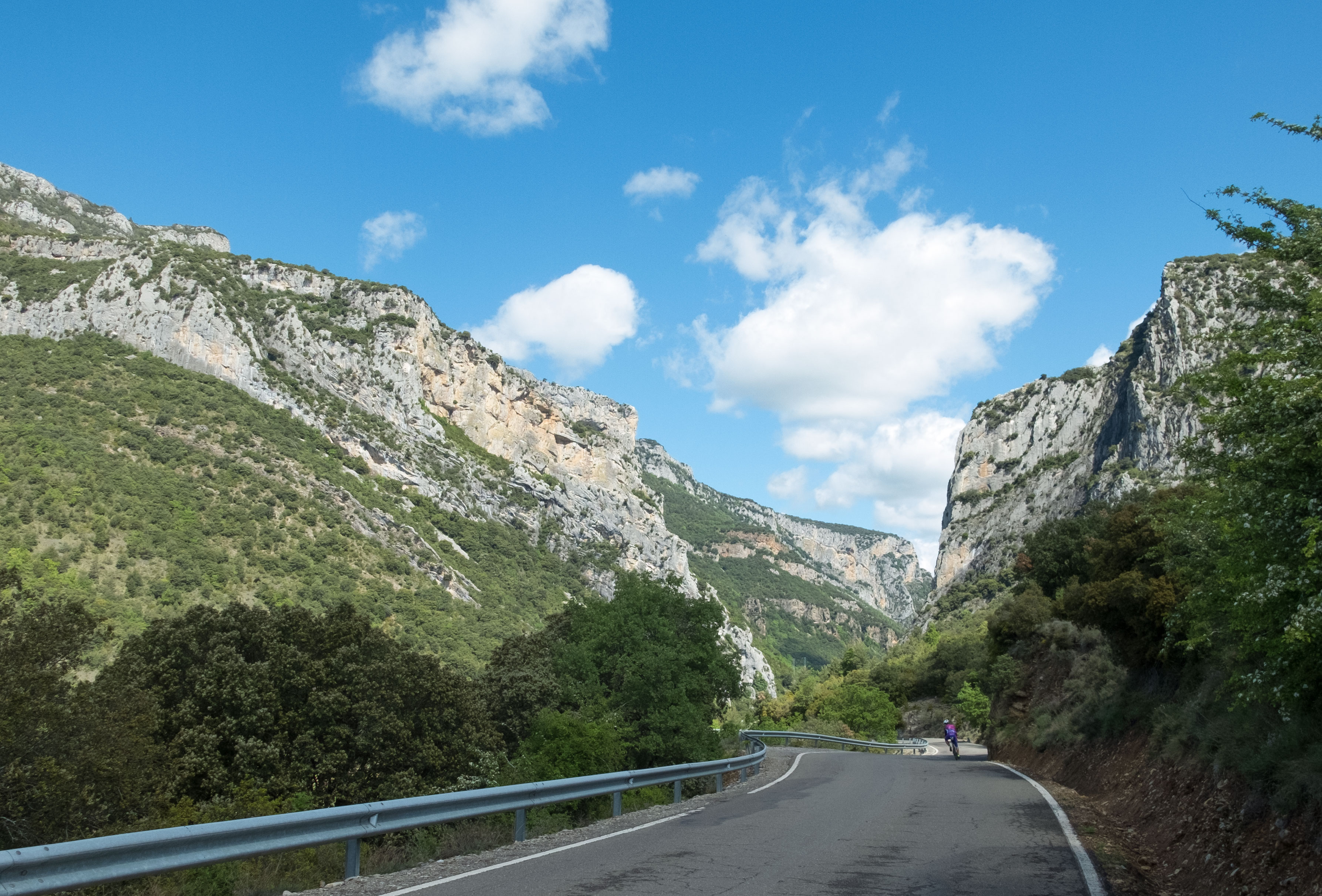 Foz de Burgui This is a photography of a Special Area of Conservation in Spain with the ID: ES0000124. Natura2000 entry, EEA entry